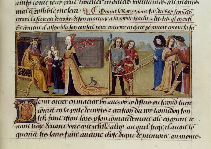 Priam et sa famille département Manuscrits occidentaux cote du document FRANCAIS 252 période du document XVIème siècle date du document ou du recueil 15..-16.. partie de Recueil des histoires de Troyes. - Cognac folio, pagination Folio 170 auteur(s) Testard, Robinet (Enlumineur) Le Fèvre, Raoul (14..-14..) (Auteur